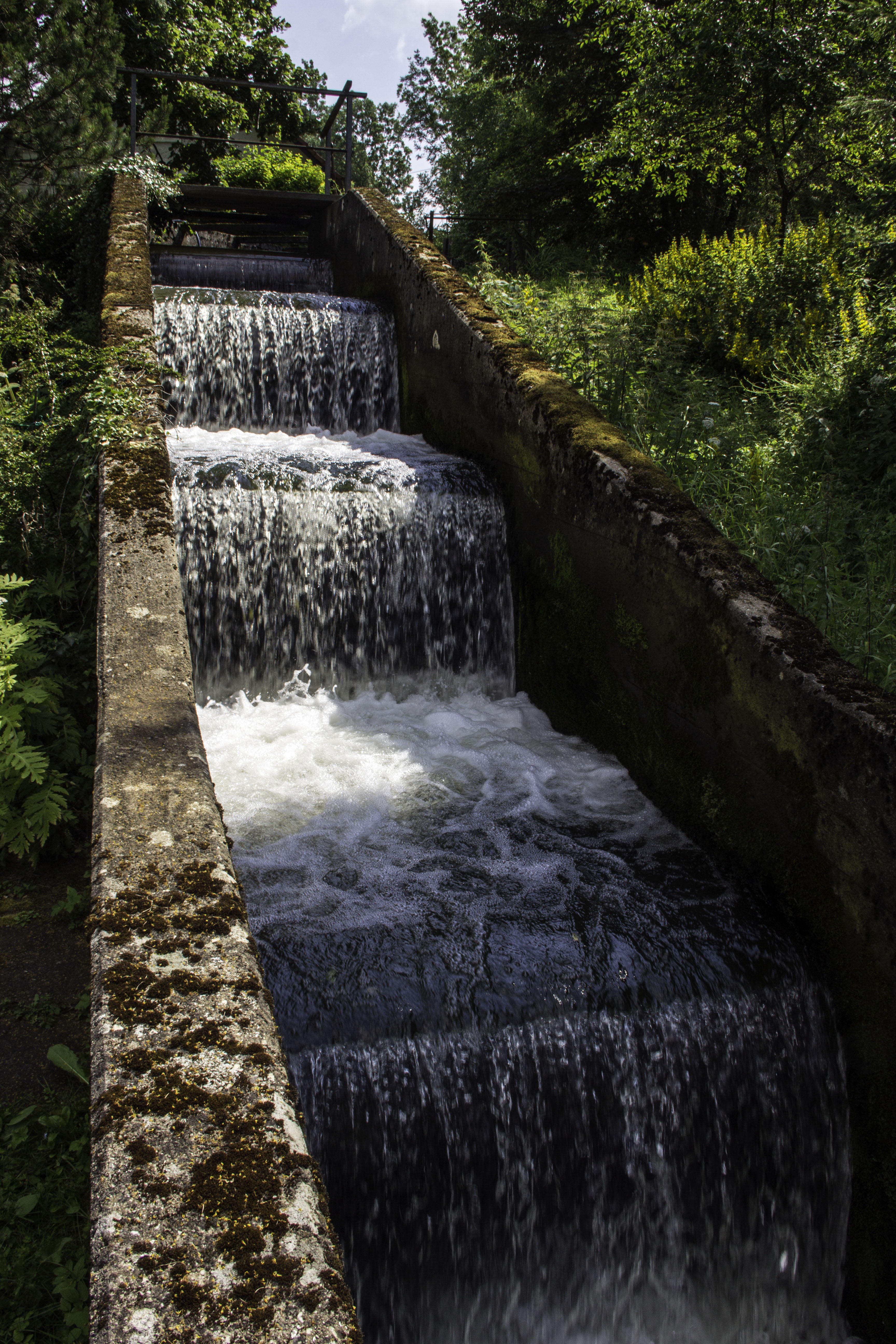 Staubershammer